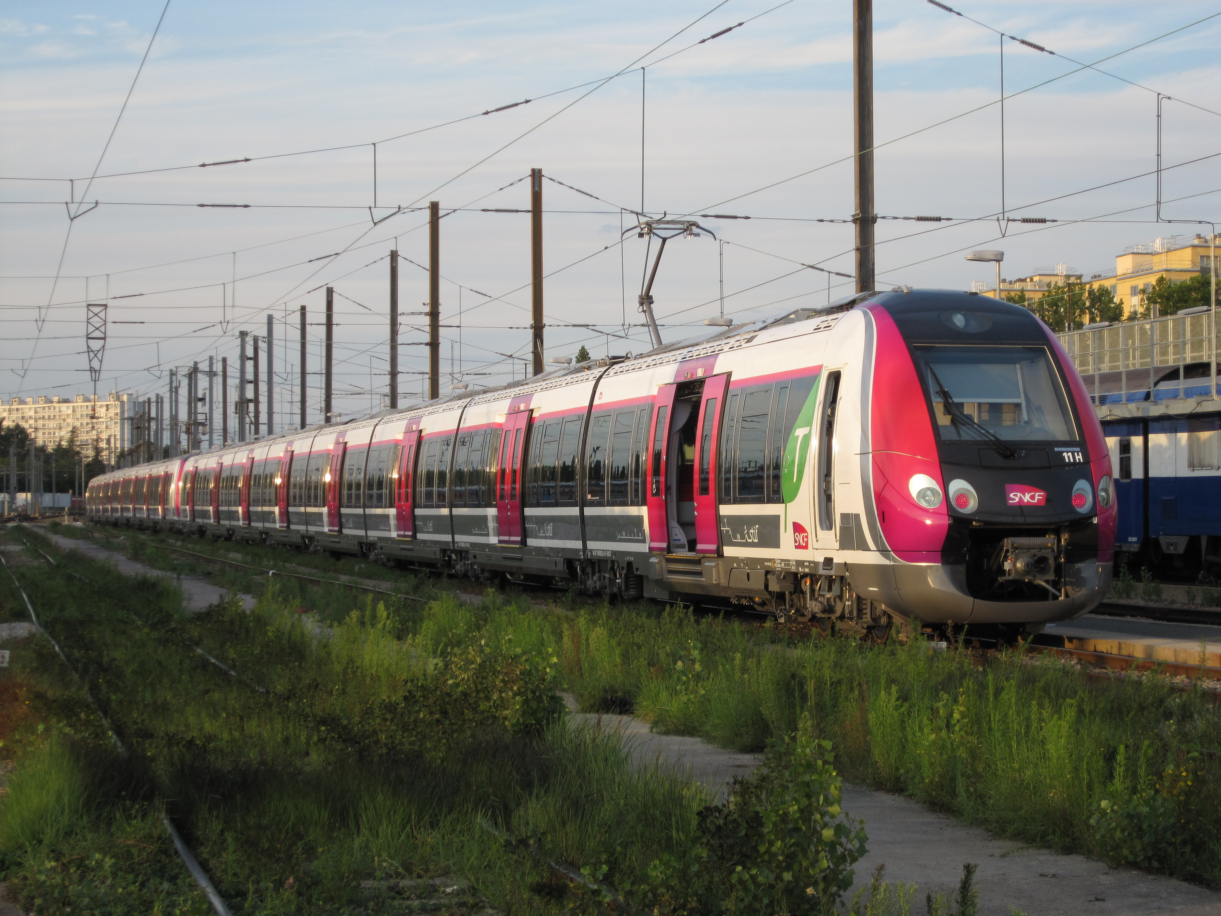 Z 50021/22 au technicentre Paris Nord-Joncherolles, Villetaneuse, Seine-Saint-Denis, France.